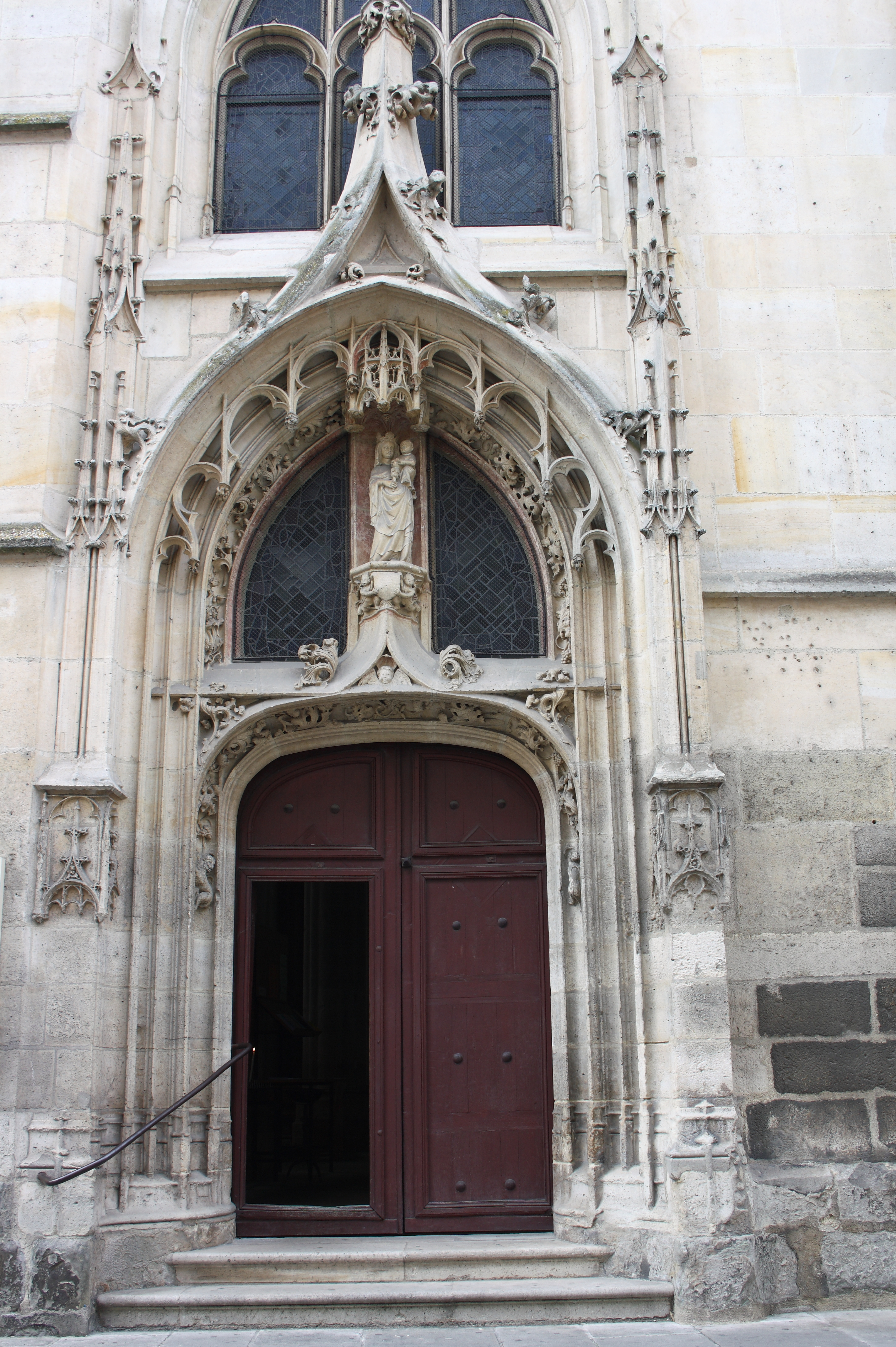 Katholische Pfarrkirche Saint-Aspais in Melun im Département Seine-et-Marne in der Region Île-de-France (Frankreich), Porte au Coq, rechtes Seitenportal an der Rue Saint-Aspais